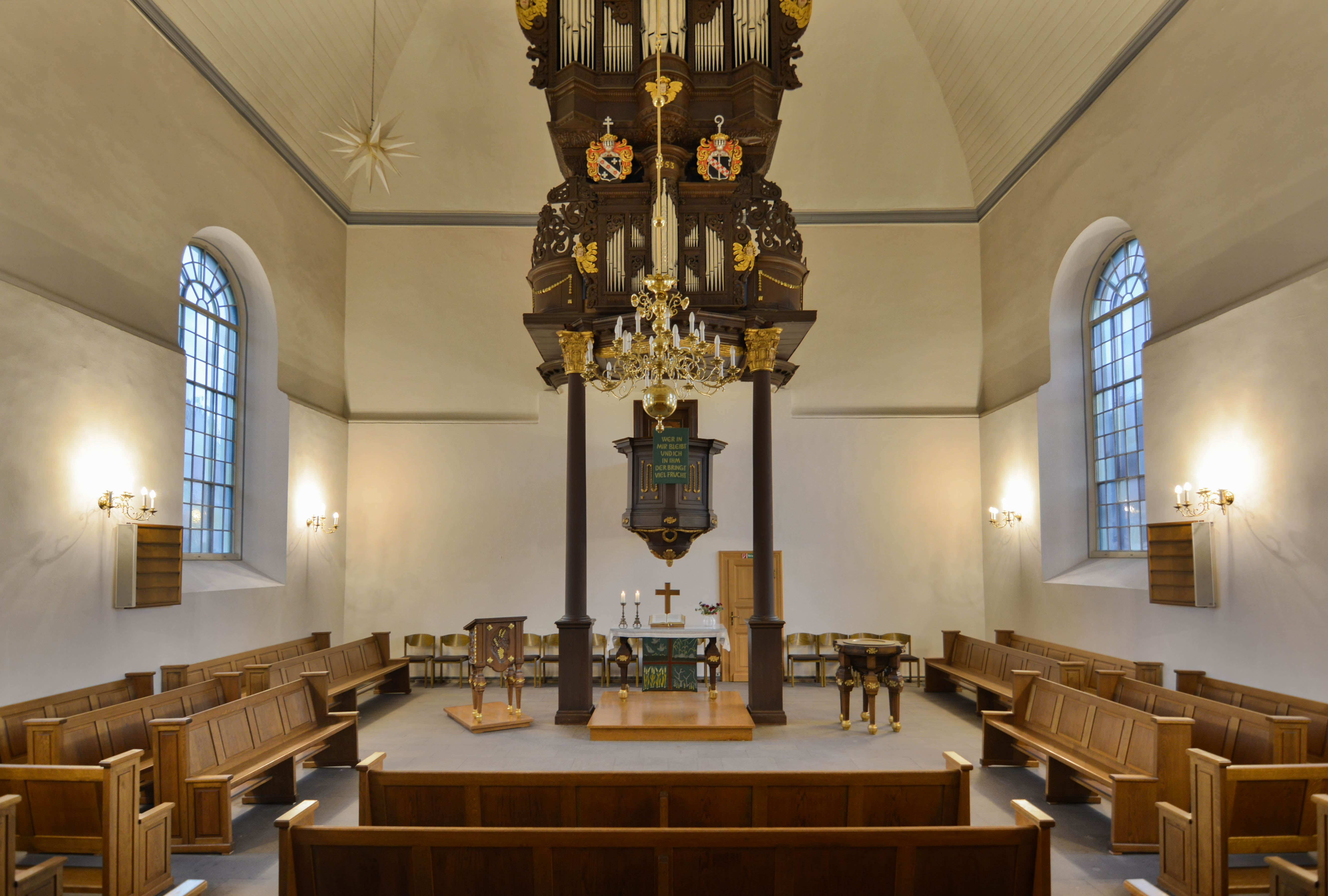 Altarraum mit OrgelThis is a photograph of an architectural monument., no. B 009